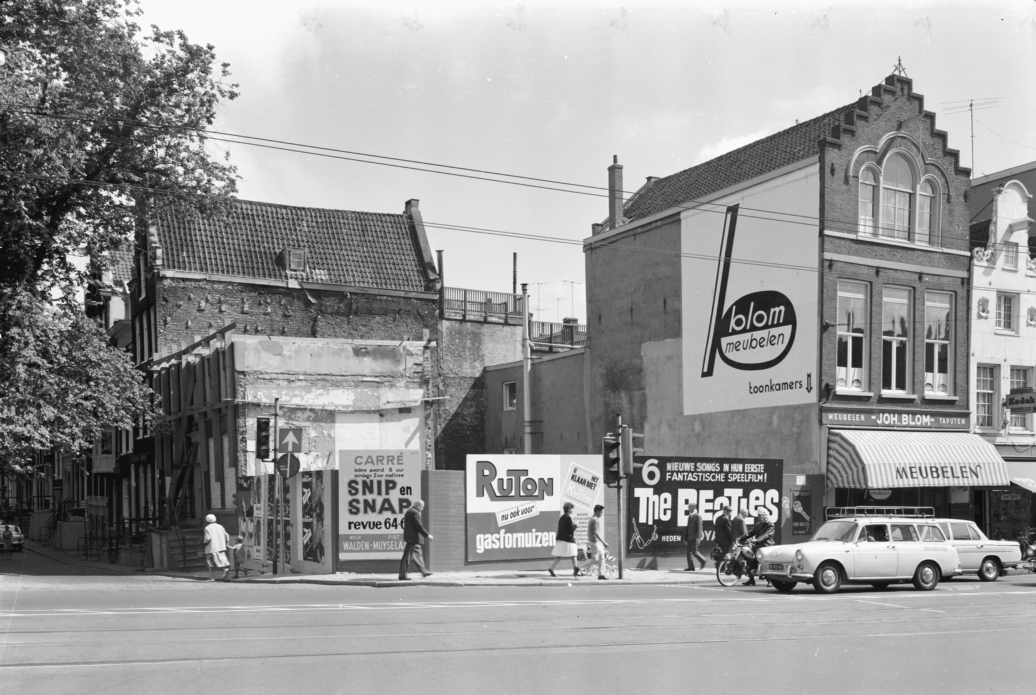 aanzicht